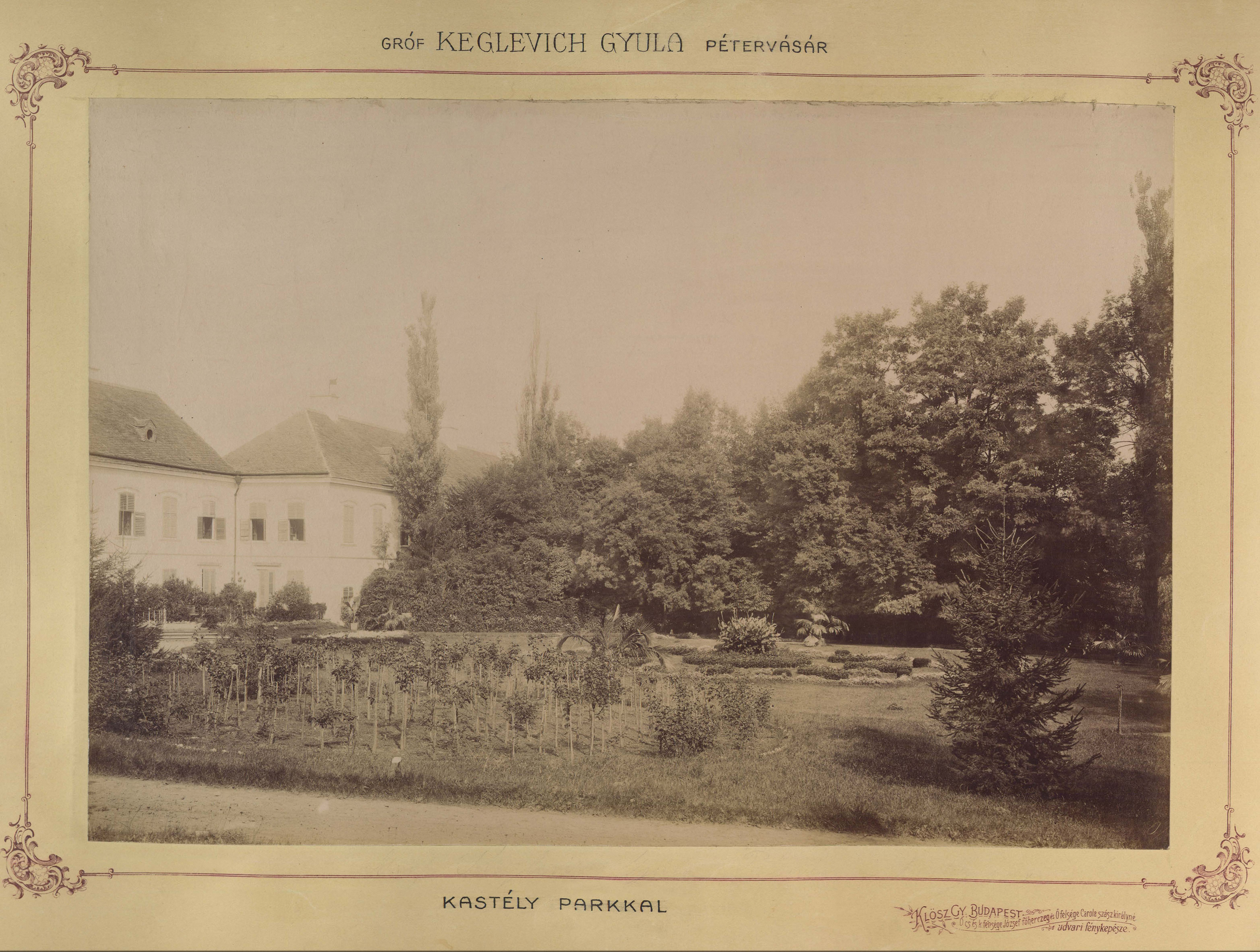 gróf Keglevich Gyula kastélyának parkja. A felvétel 1895-1899 között készült. A kép forrását kérjük így adja meg: Fortepan / Budapest Főváros Levéltára. Levéltári jelzet: HU.BFL.XV.19.d.1.12.056 Location: Hungary